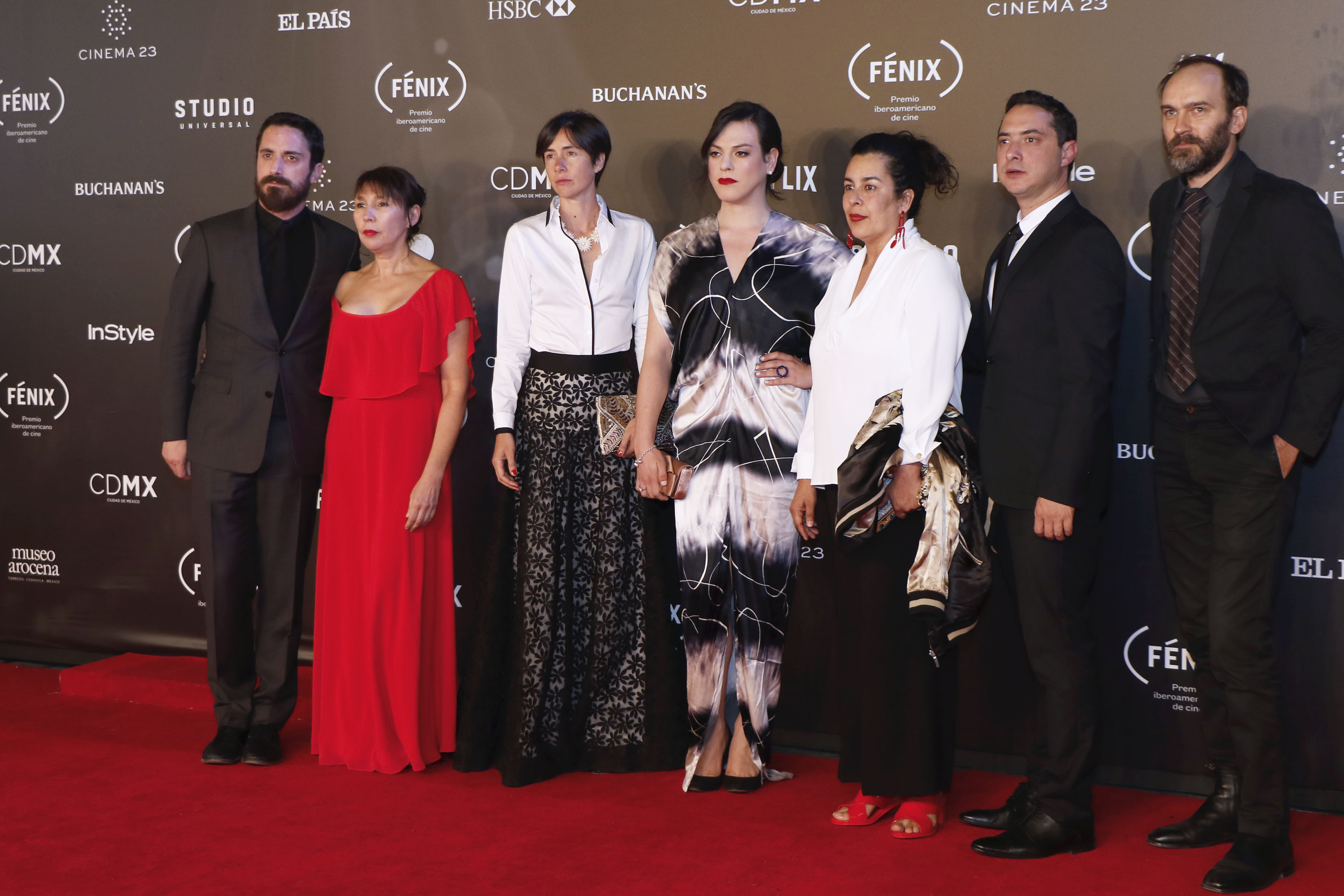 Miércoles 6 de diciembre de 2017 En el Teatro de la Ciudad Esperanza Iris, se realizó la 4ª Entrega del Premio Iberoamericano de Cine, Fénix, previo a la ceremonia, nominados, conductores, presentadores y elencos, desfilaron por la alfombra roja.Fotografía: Milton Martínez / Secretaría de Cultura CDMX